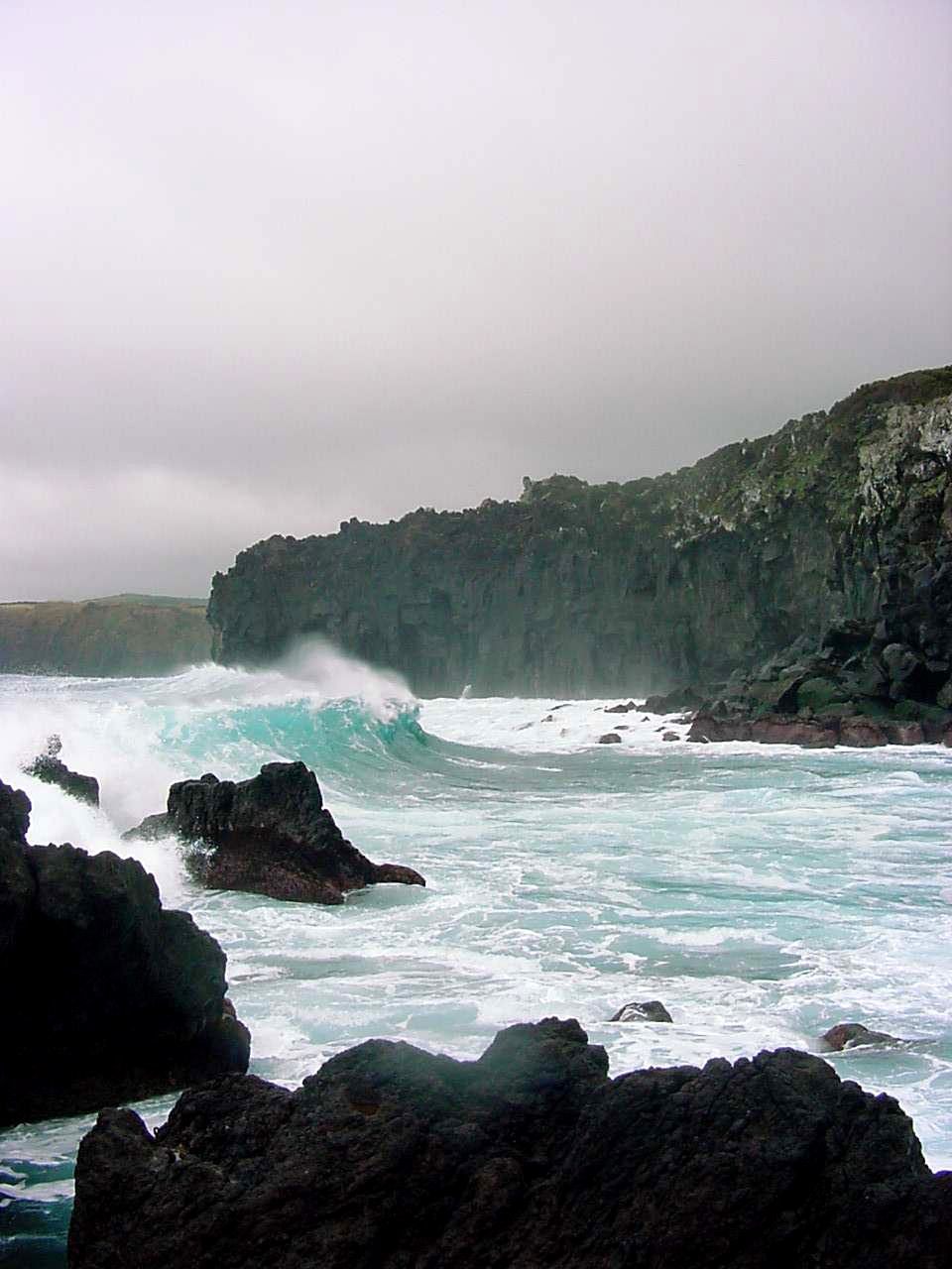 Costa dos Biscoitos, Costa Norte da ilha Terceira, Açores, Portugal